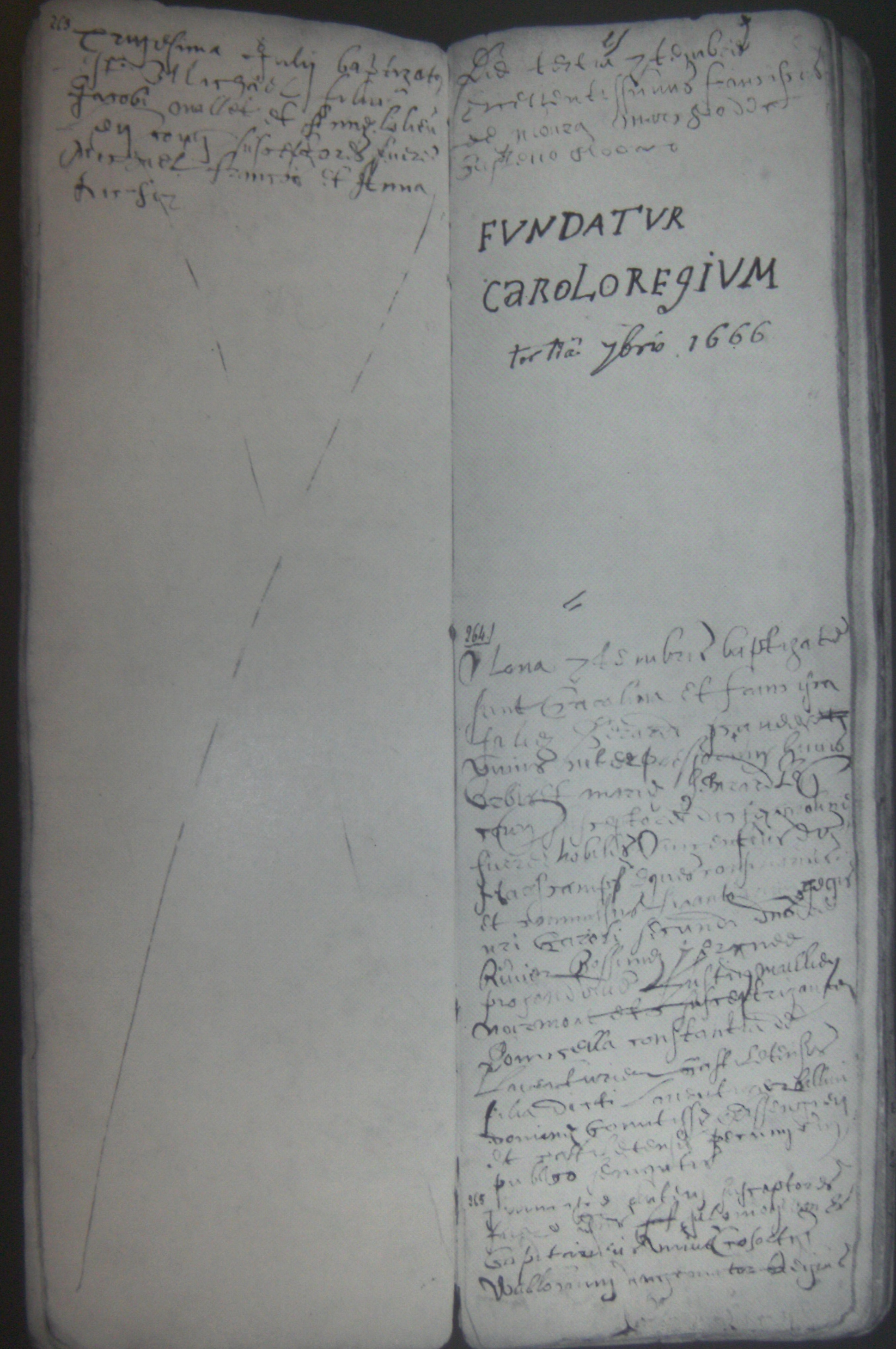 chronogramme latin "FVNDATVR CAROLOREGIVM" inscrit dans le registre des baptêmes de la paroisse du Charnoy à la date du 3 septembre 1666 marquant la fondation de Charleroi (Belgique).